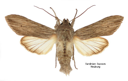 Cucullia tanaceti.